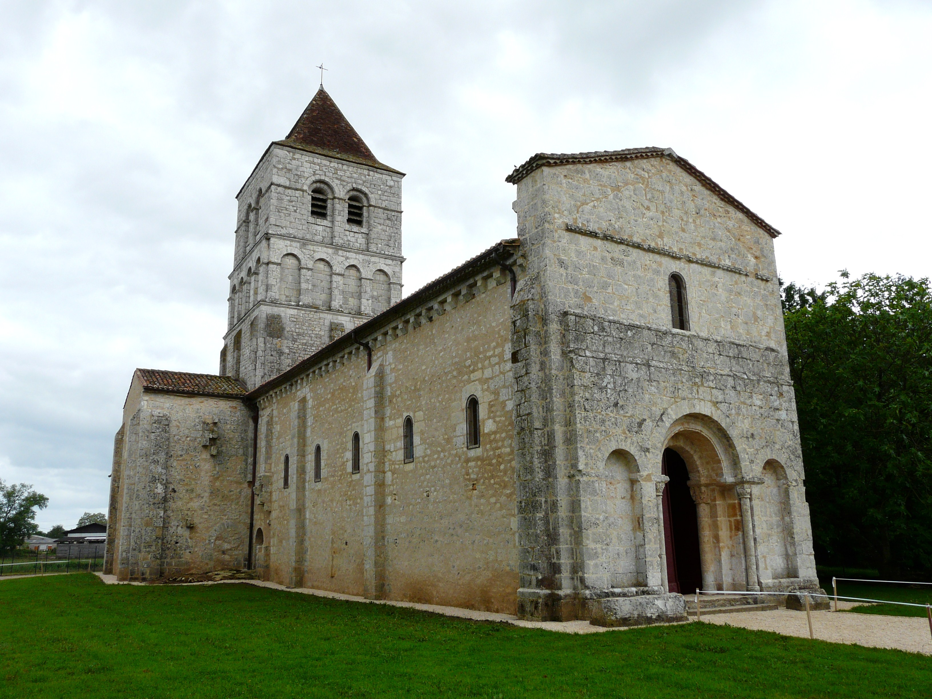 L'église Saint-Robert, Javerlhac-et-la-Chapelle-Saint-Robert, Dordogne, France.